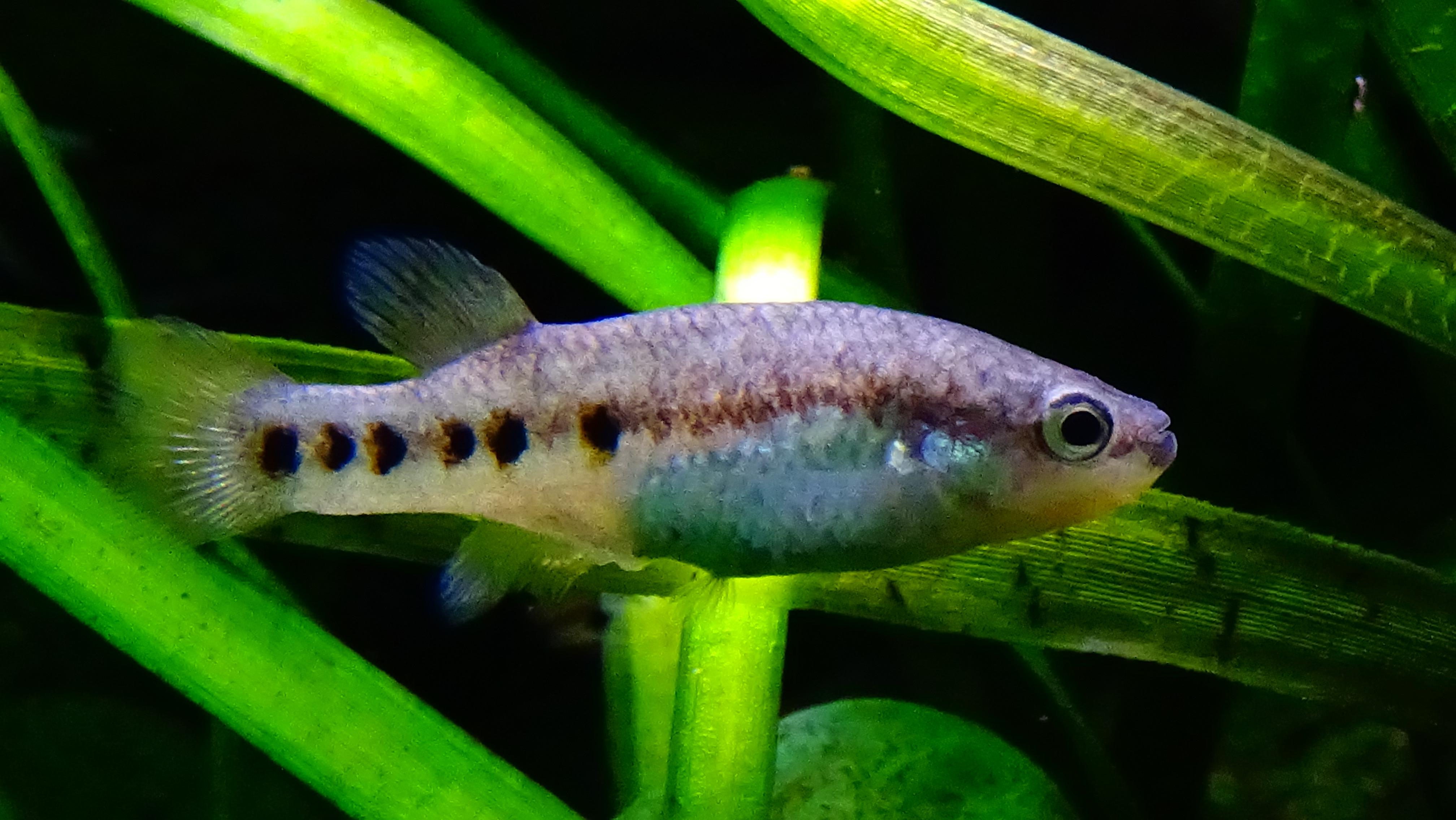 Characodon lateralis - Aquarium Tropical du Palais de la Porte Dorée - Paris/France - 05/2015